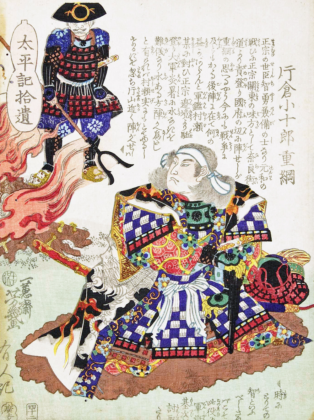 「太平記拾遺四十二：片倉小十郎重綱」